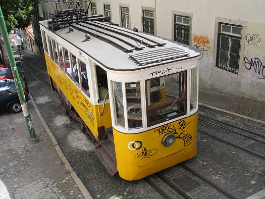 Elevador da GlóriaÆnglisc: (glory elevator), Lisbon, Portugal